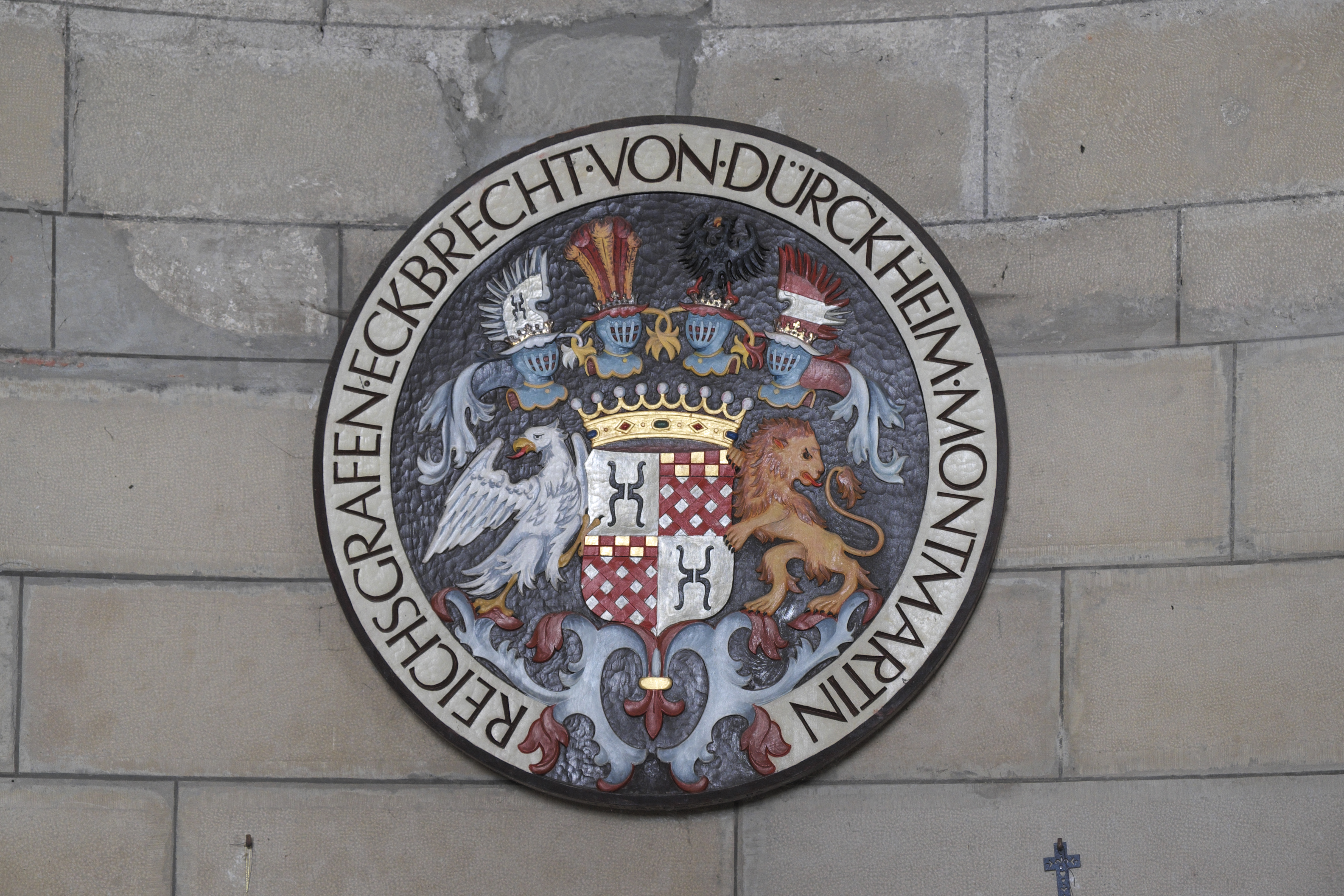 Johanneskapelle des ehemaligen Prämonstratenserklosters in Steingaden im Landkreis Weilheim-Schongau (Bayern/Deutschland), Wappenscheibe